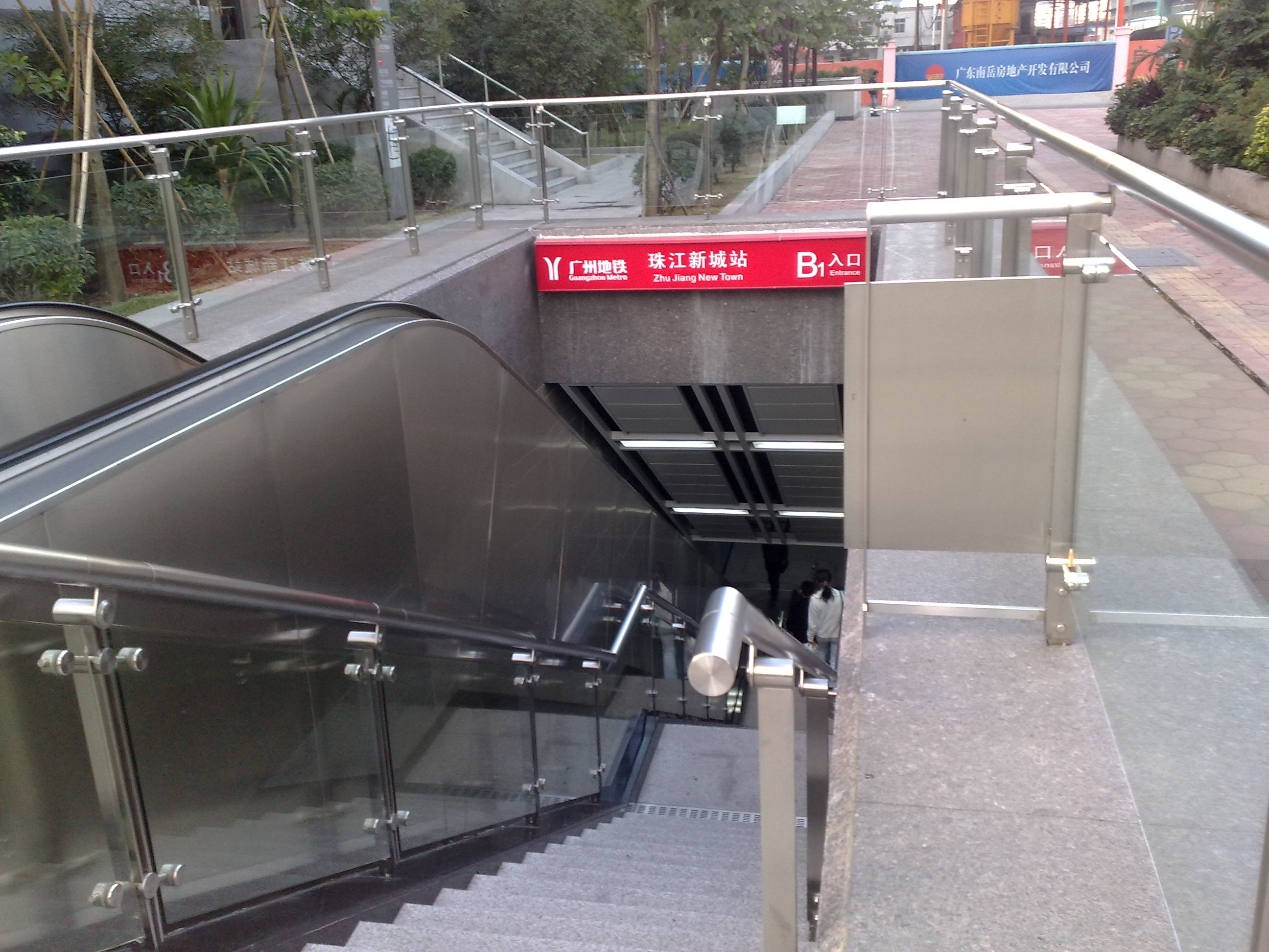 廣州地鐵珠江新城站出入口。